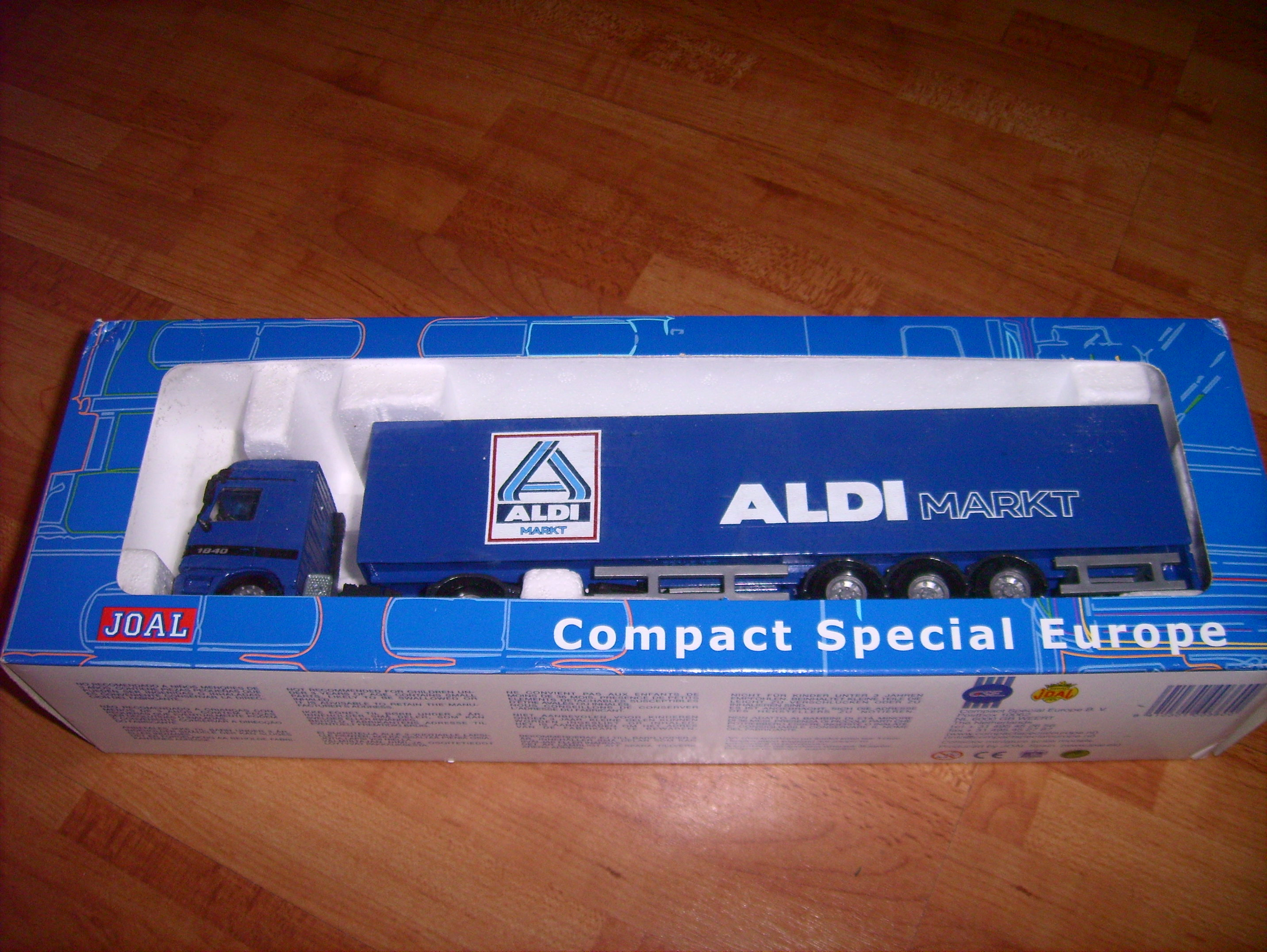 Modell-LKW des Herstellers "Joal" im Maßstab 1:50, Beschriftung auf "ALDI-Nord" / "ALDI Markt". Angeboten ca. 2001. Modell leider jedoch nicht originalgetreu, da Aldi sämtlicherweise nur zweiachsige Sattelauflieger einsetzt, keine Dreiachser.